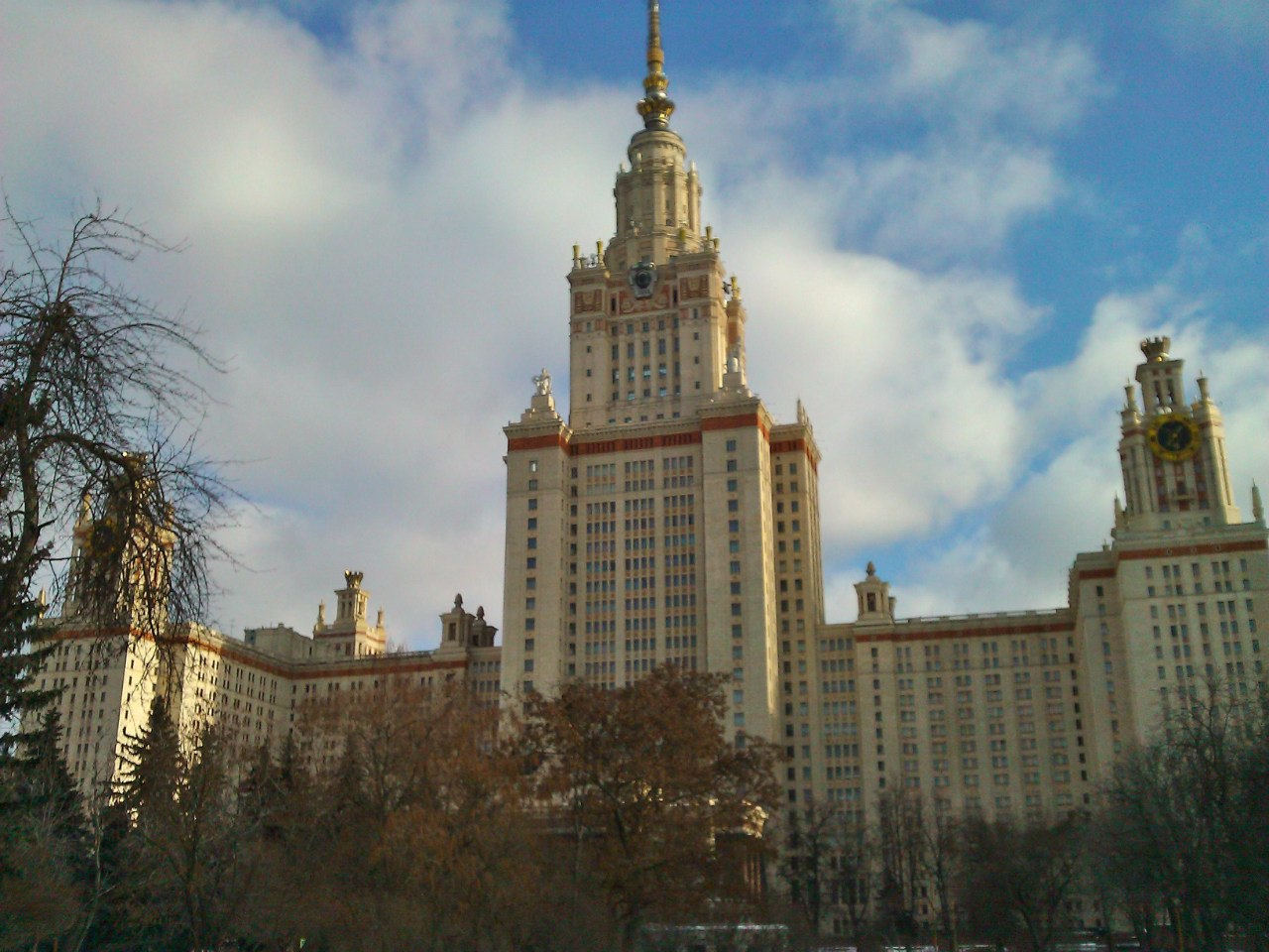 Московский государственный университет им. Ломоносова (Москва и Московская область